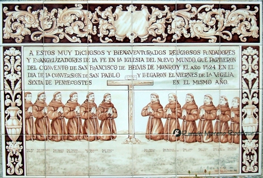 Azulejo ubicado a las afueras del convento franciscano de Belvis de Monroy, Cáceres, que reproduce un mural del siglo XVI que se encuentra en la sala capitular del convento franciscano de Huejotzingo, Puebla